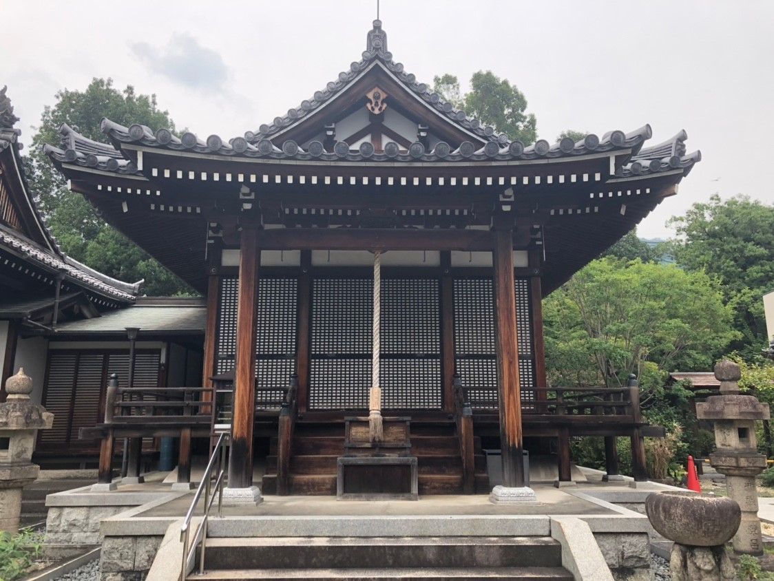 2019年8月、千手寺で撮影。